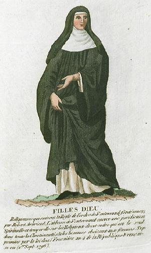 Collection de costumes de tous les ordres monastiques, supprimés à differentes époques, dans la ci-devant Belgique, Bruxelles, Philippe Joseph Maillart et sœur, 1811